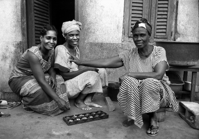 Jeux d'Awale Afrique Je suis l'auteur de l'image (Andre Perron